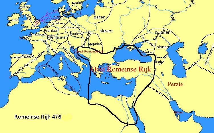 Het Romeinse Rijk in nl:476. Terwijl het Oost-Romeinse Rijk tamelijk ongeschonden de volksverhuizing is doorgekomen is het West-Romeinse Rijk praktisch verdwenen. Het voormalige grondgebied is bezet door Germaanse stammen die in theorie wel de oost romeinse keizer erkennen als opperheer maar in de praktijk gaan ze hun eigen gang. Gemaakt door Hannes Karnoefel met de GIMP. (Aangepast door:Evil berry)